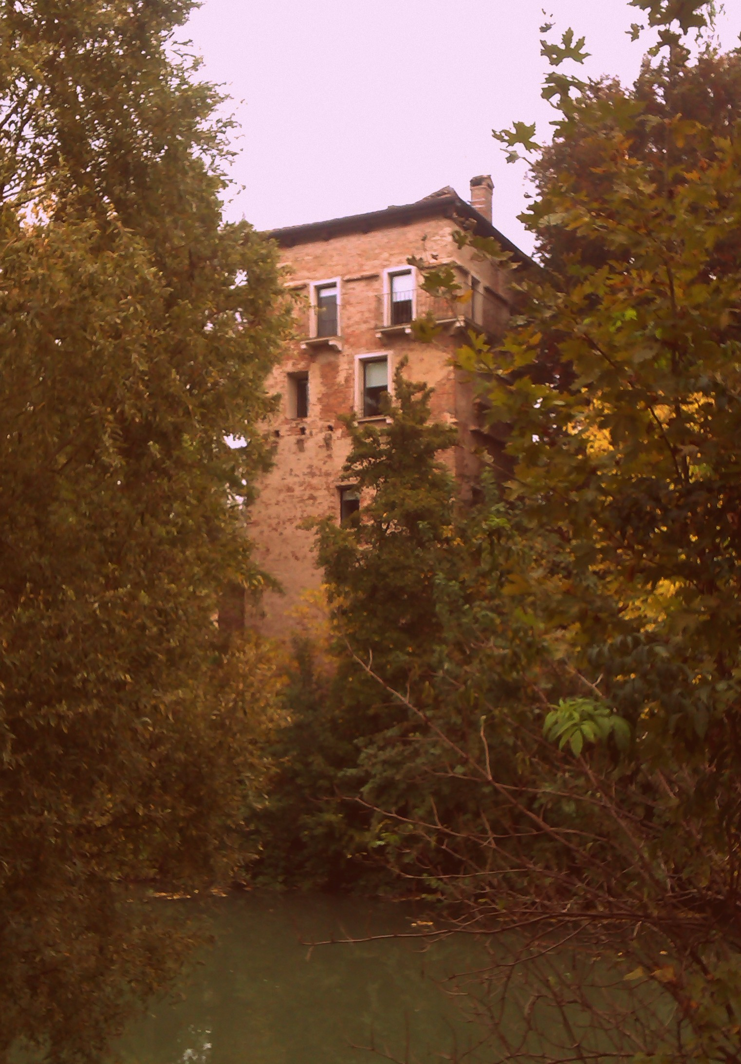 Fortificazione del Soccorso, Padova